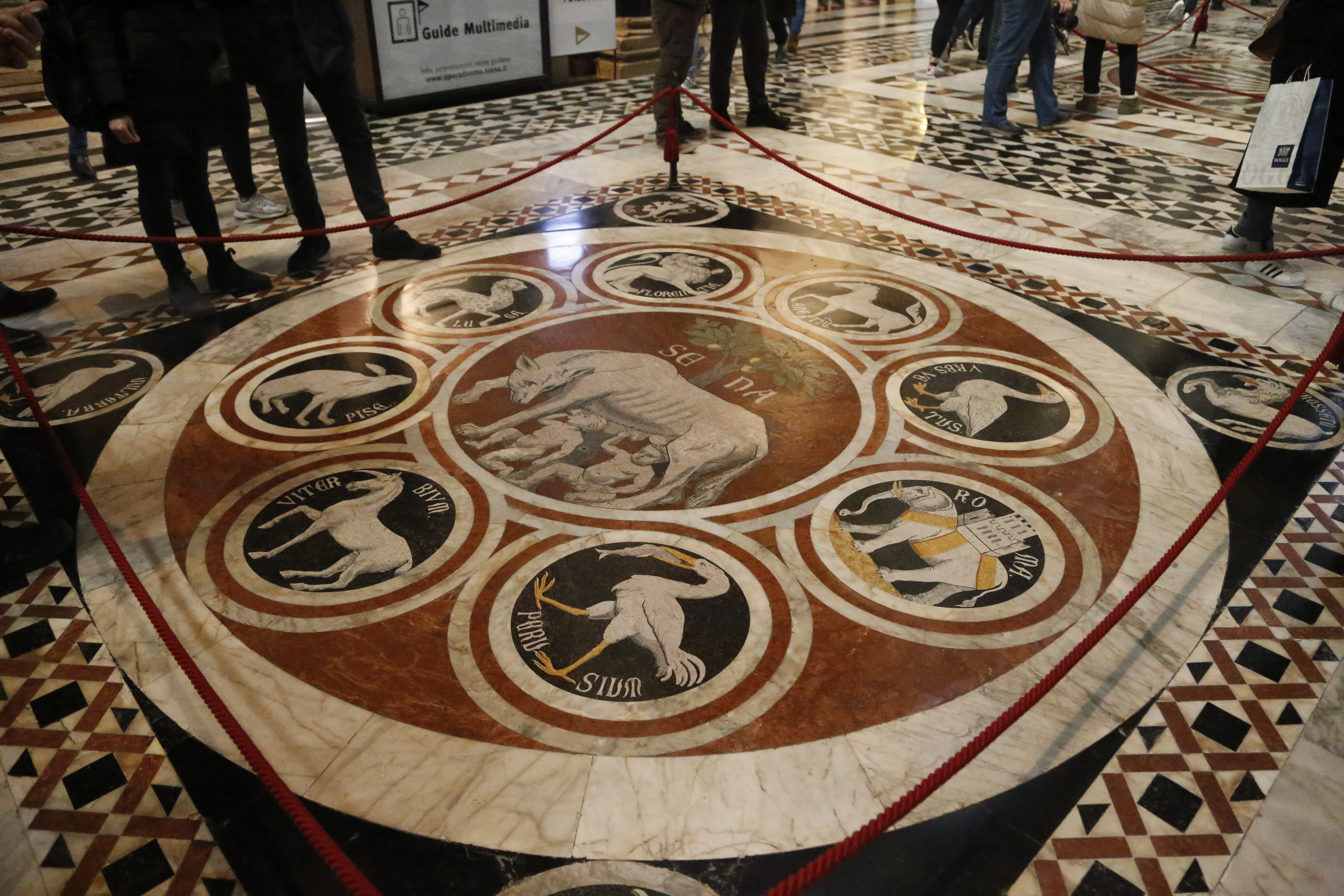 Duomo di Siena